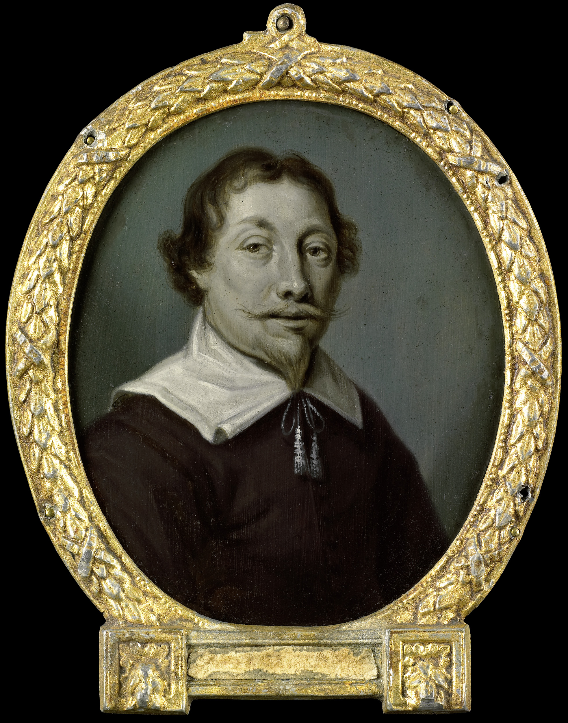 Portret van Jan van der Veen (ca.1600-59). Apotheker en dichter te Deventer. Buste in ovaal, naar rechts. Vervaardigd naar een onbekend voorbeeld. Onderdeel van een verzameling portretten van Nederlandse dichters. Collection: schilderijen; Panpoeticon Batavum